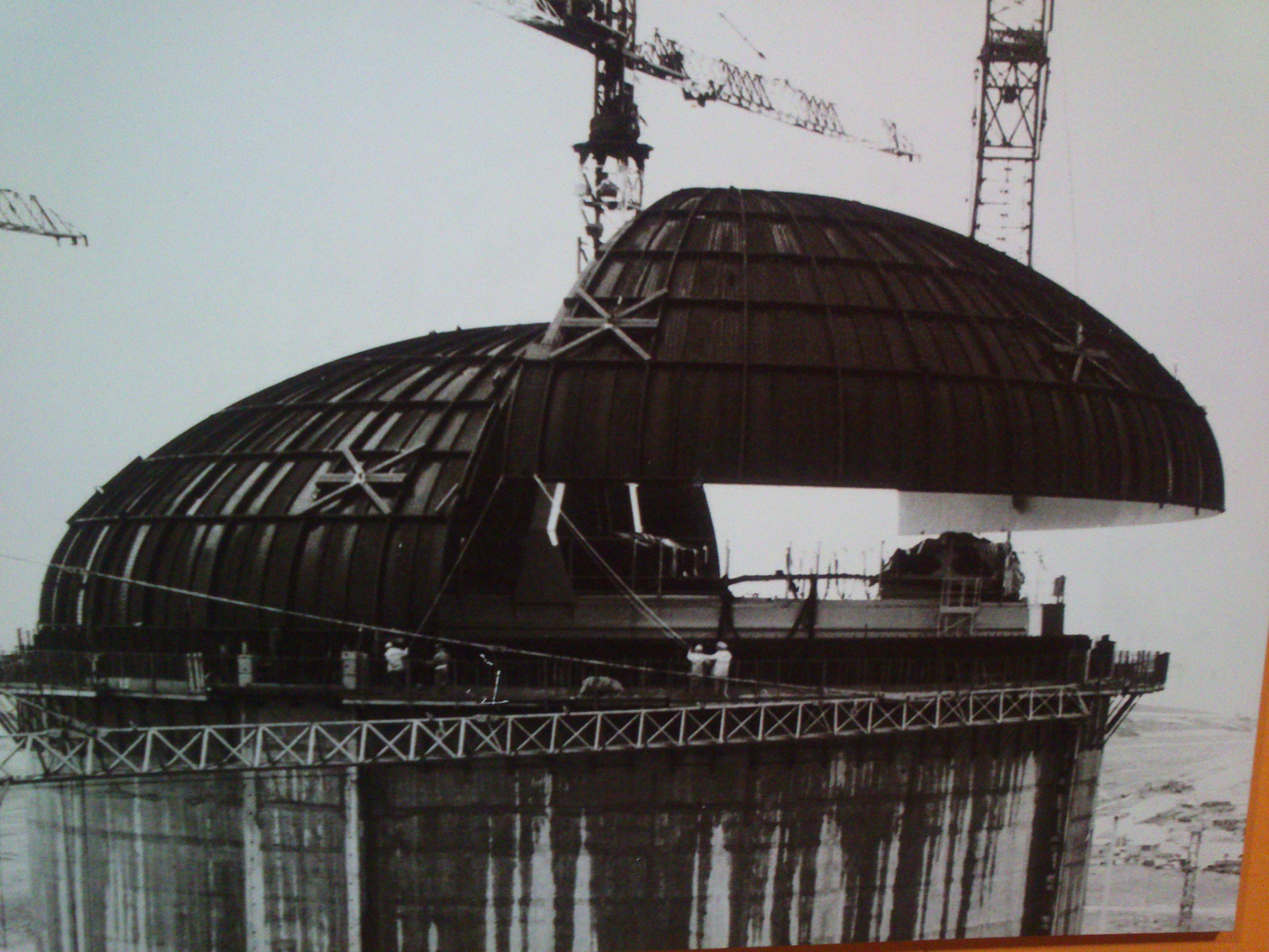 Centrale nucléaire de Gravelines Construction - pose dome bâtiment réacteur